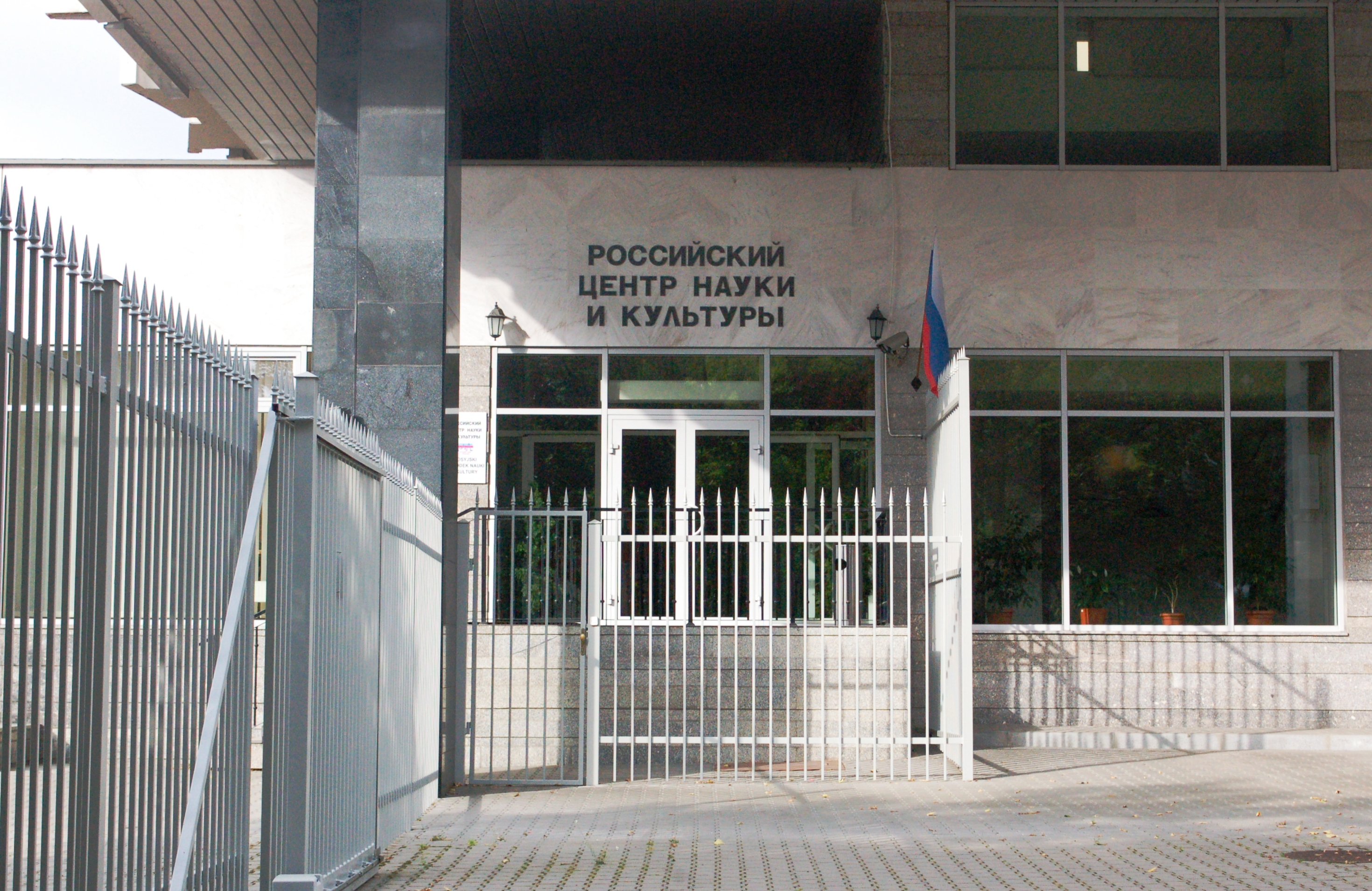 russisches Konsulat, Belwederska, Warschau